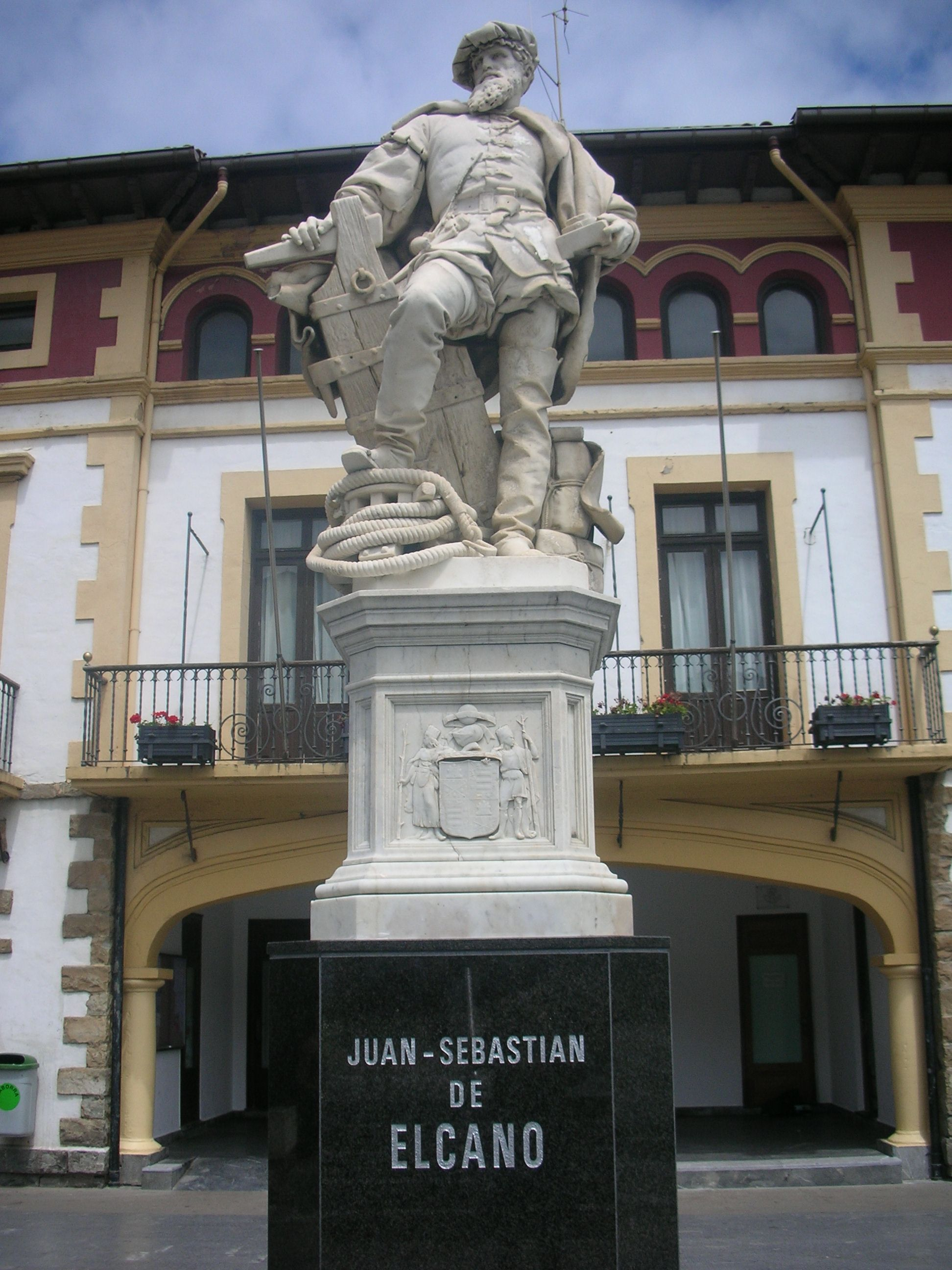 Depicted person: Juan Sebastián Elcano.